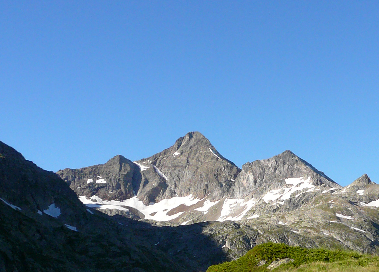 Pic d'Arriel